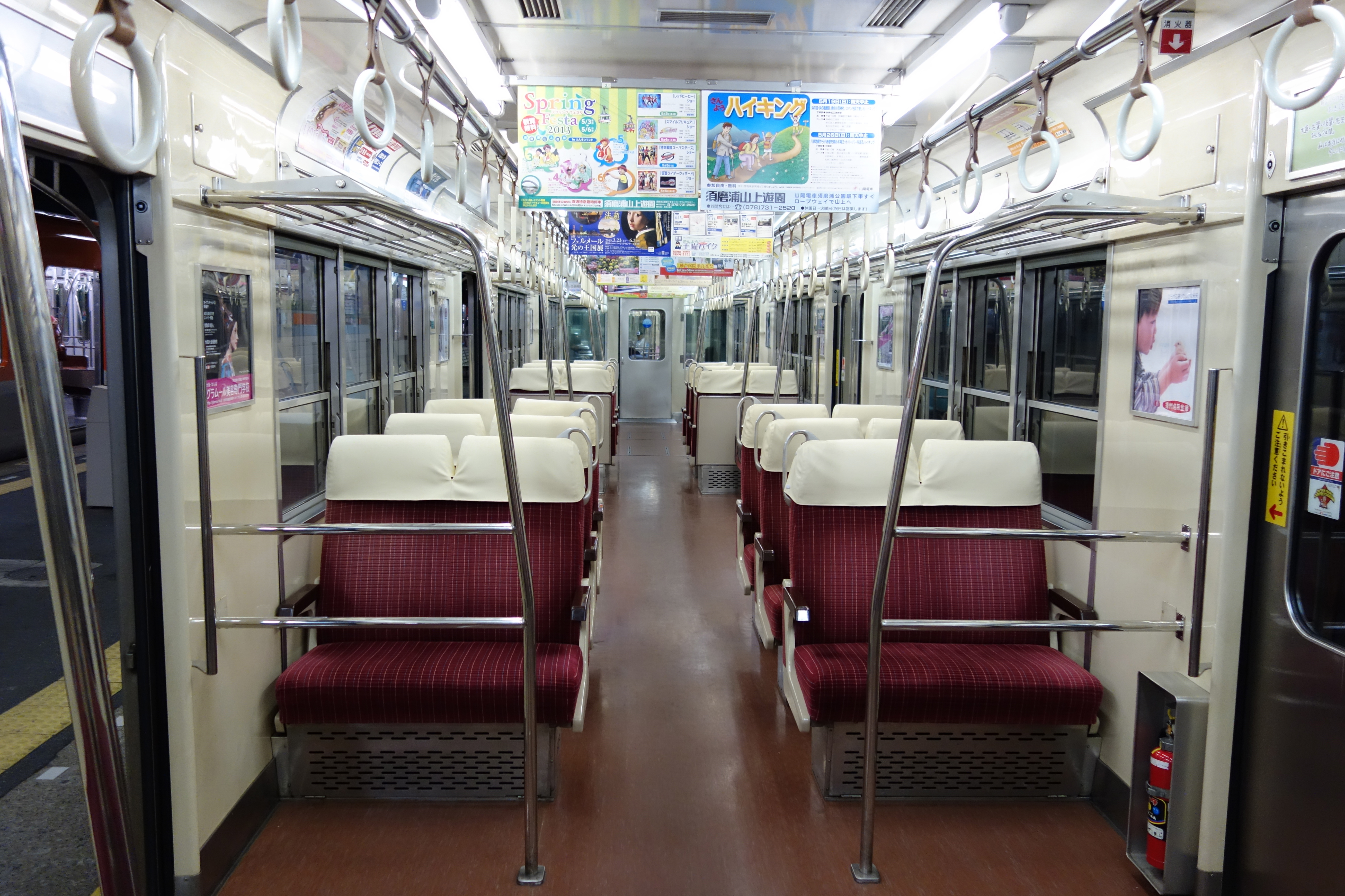 山陽電鉄3050系 3075 （3074F）車内 （大塩駅停車中・2013年5月3日撮影）